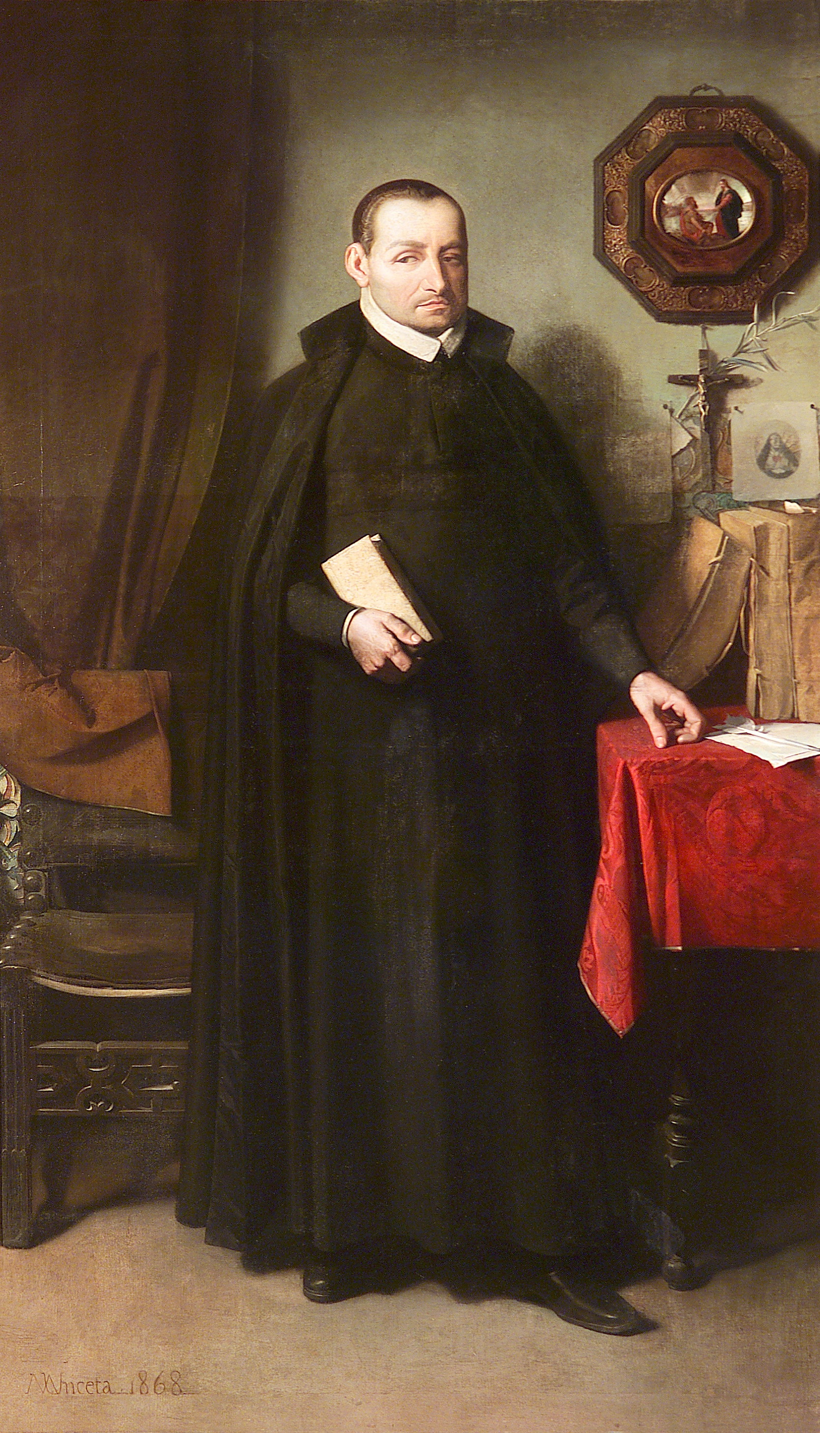 Retrato del eclesiástico, poeta e historiador español Bartolomé Leonardo de Argensola (1562-1631).